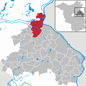 Bad Freienwalde (Oder) in Brandenburg (Country) - District Märkisch-Oderland